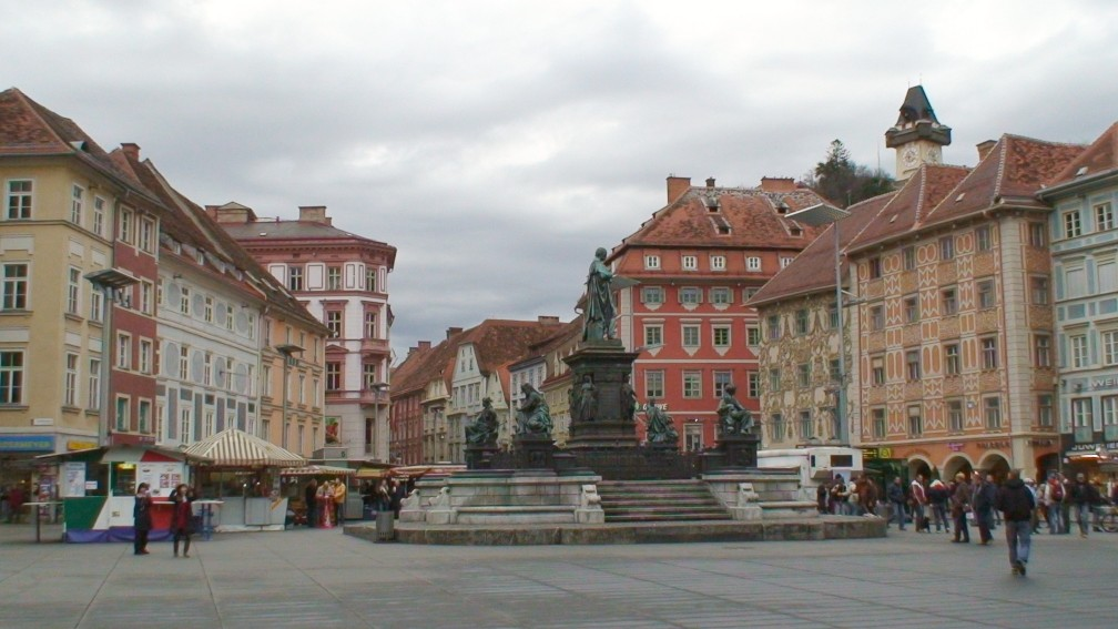 Hauptplatz in Graz mit Erzherzog Johann Brunnen (von Franz Pönninger, 1878) (2007)